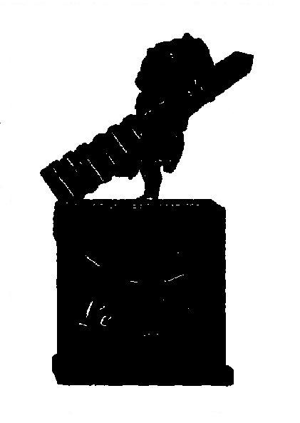 Portrait charge de l'ingénieur Lebas, dominotier, par Dantan jeune. Il porte sous le bras l'obélisque de Louqsor, érigé par lui, en 1836, sur la place de la Concorde, à Paris. Dessin reproduit dans : John Grand-Carteret, Vieux papiers, vieilles images, cartons d'un collectionneur..., éditeur : A. Le Vasseur, Paris 1896, page 312.